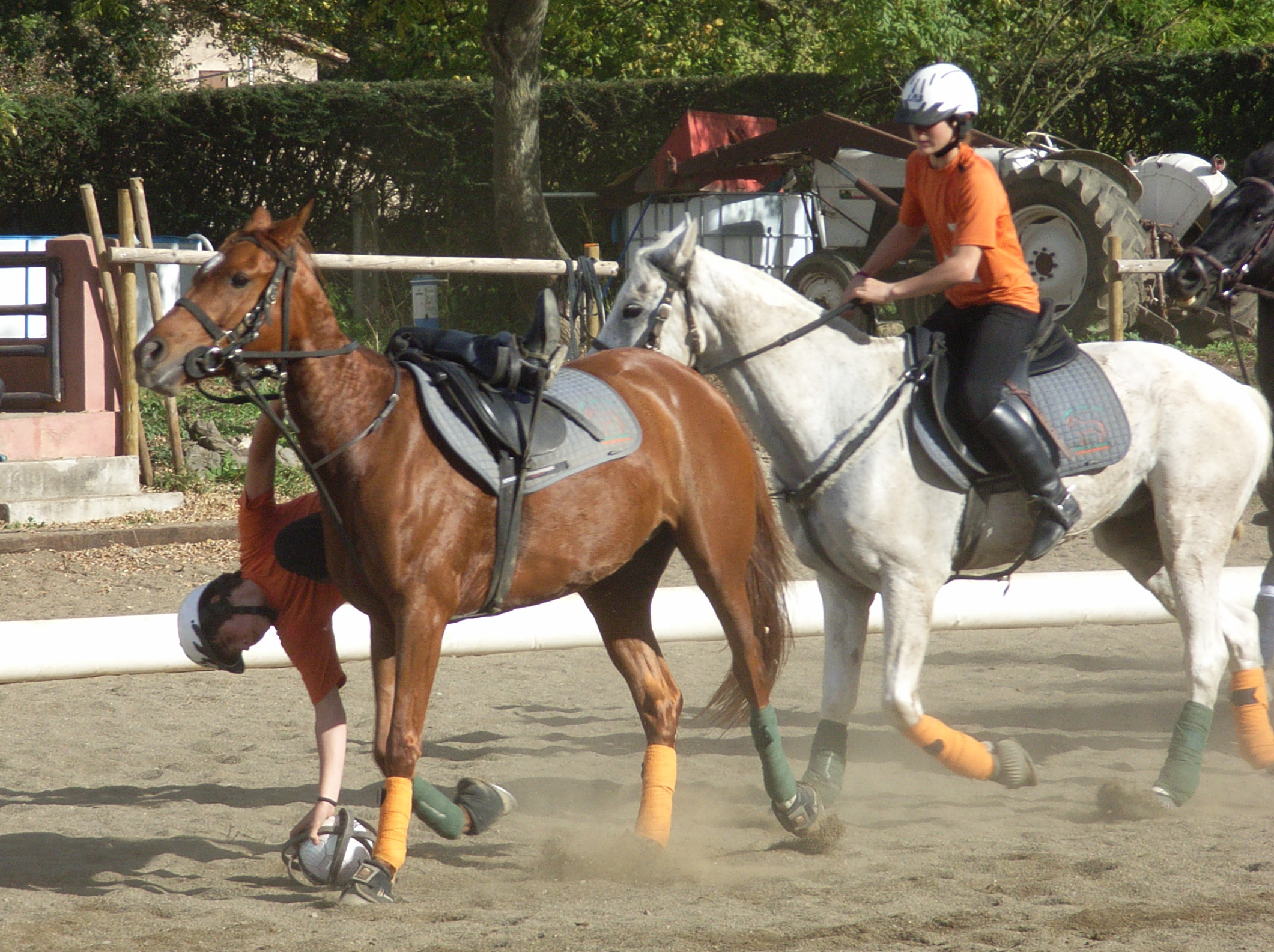 recollida pilota de horse-ball